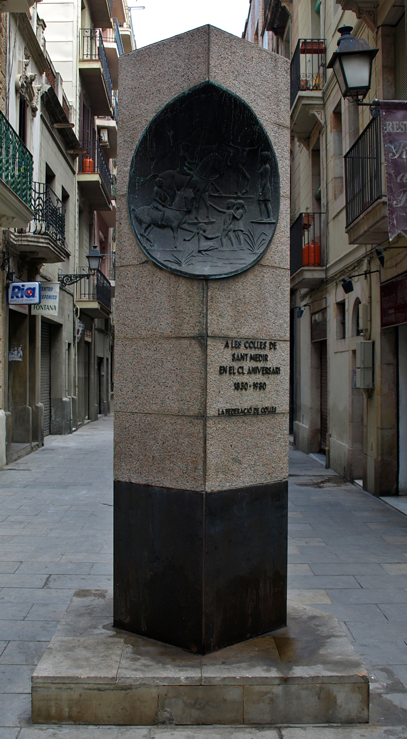 A les Colles de Sant Medir (Núria Tortras, 1969)